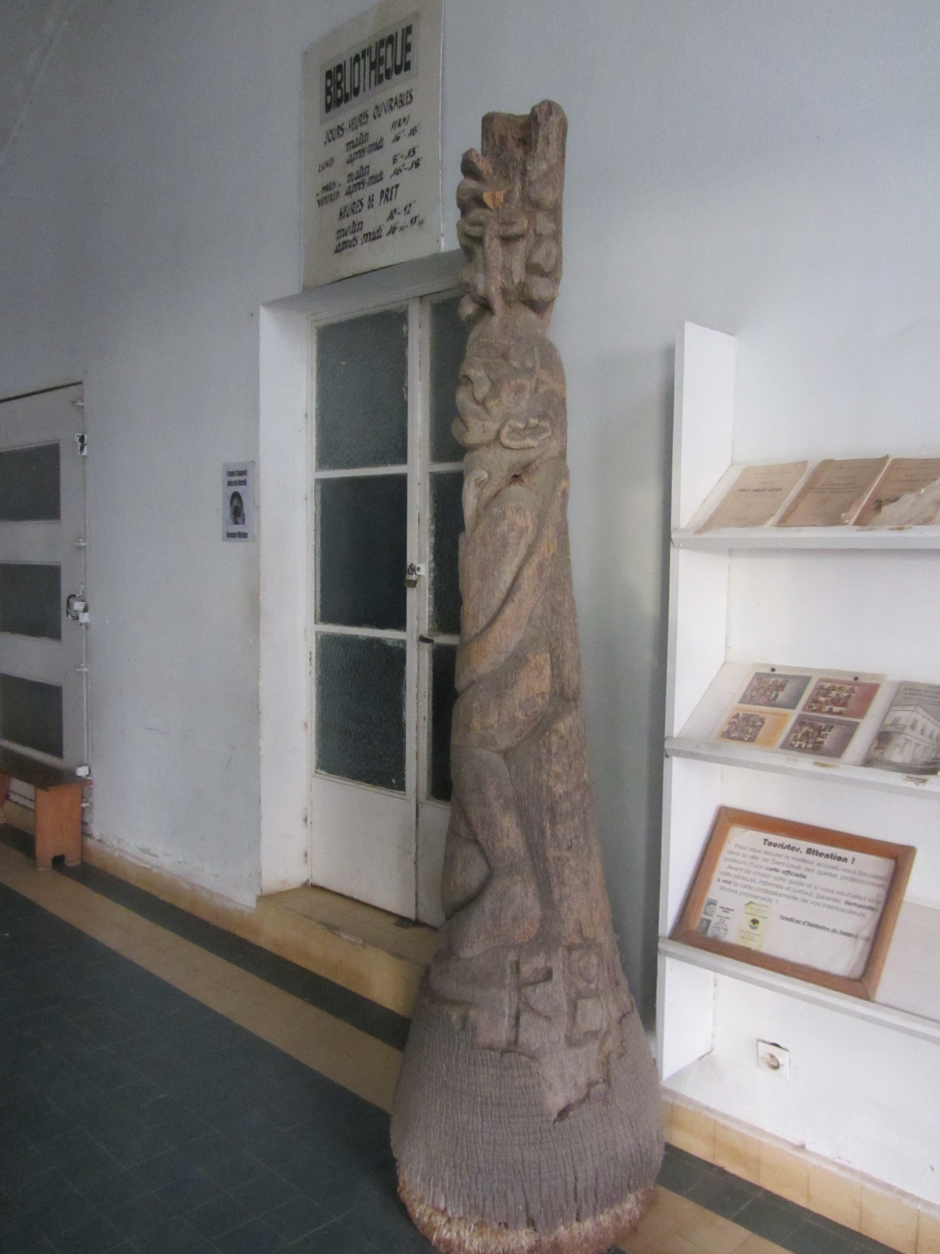 This document was produced using the Canon PowerShot SX230 HS lent by Wikimedia France. Saint-Louis : Musée du Centre de Recherches et de Documentation du Sénégal, sculpture taillée dans un tronc d'arbre